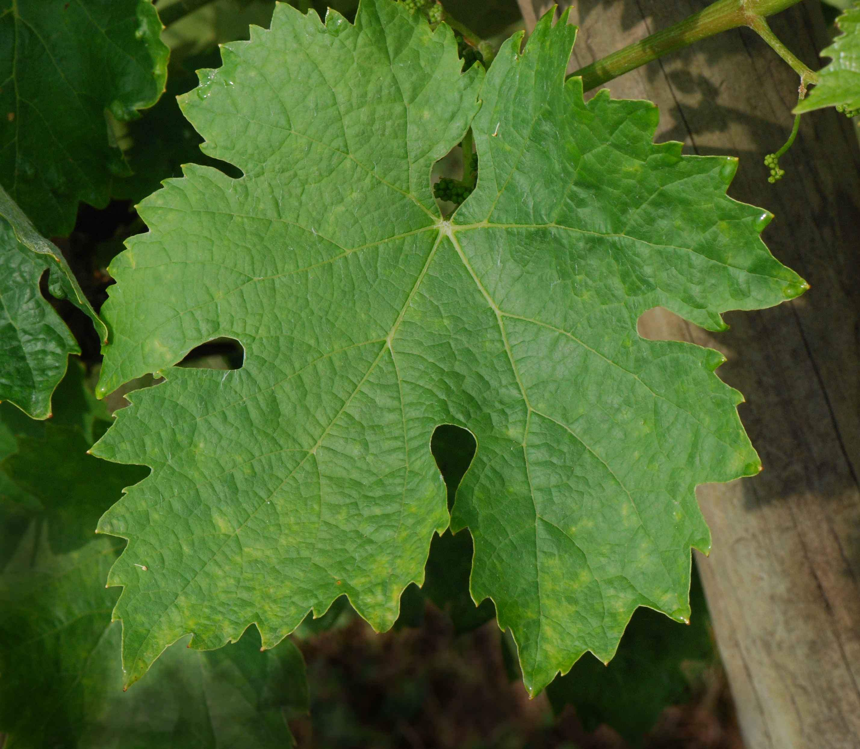 Ugni blanc, Conservatoire du vignoble charentais, Cherves